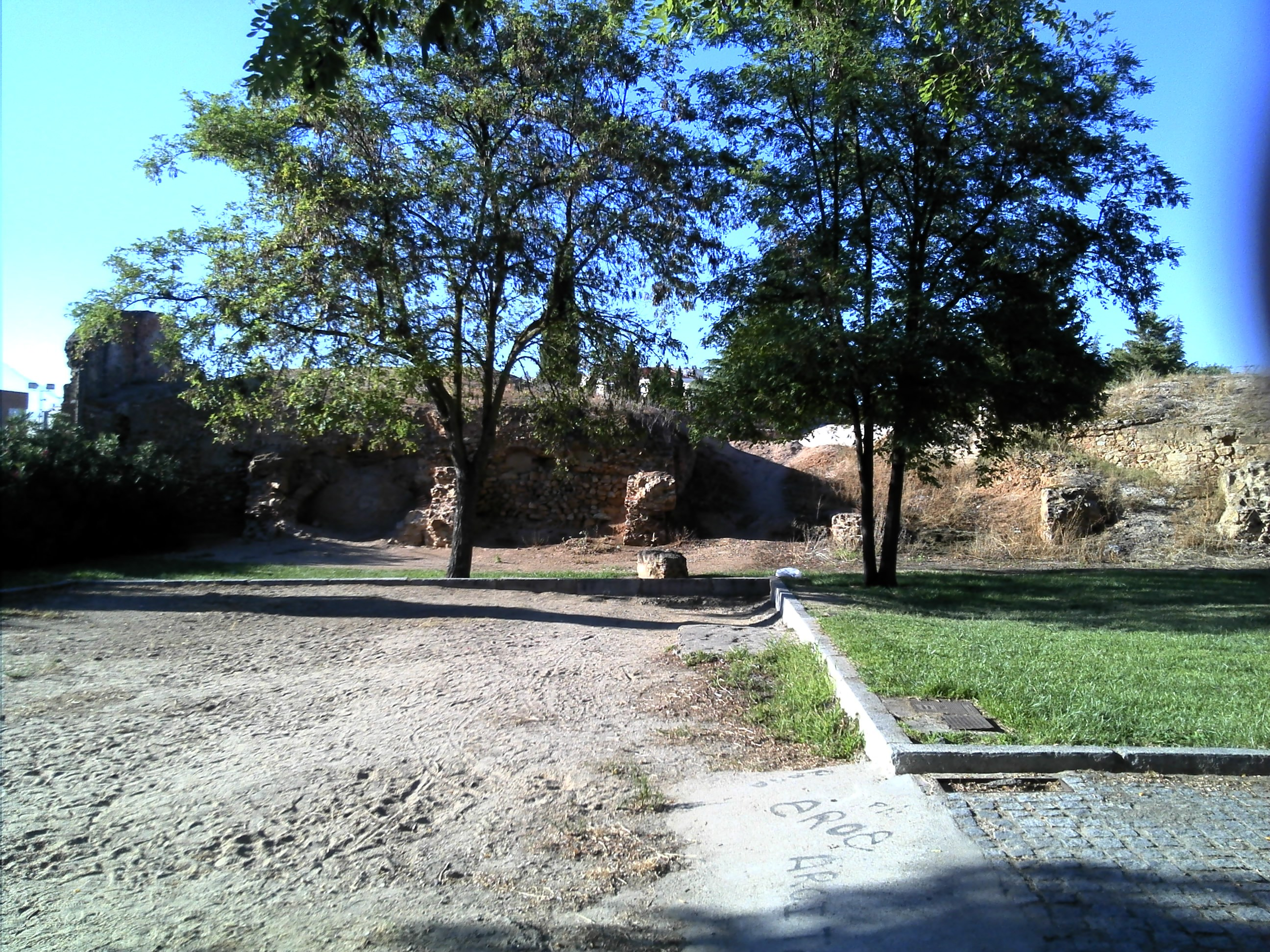 Ruinas Fuerte de Pardaleras